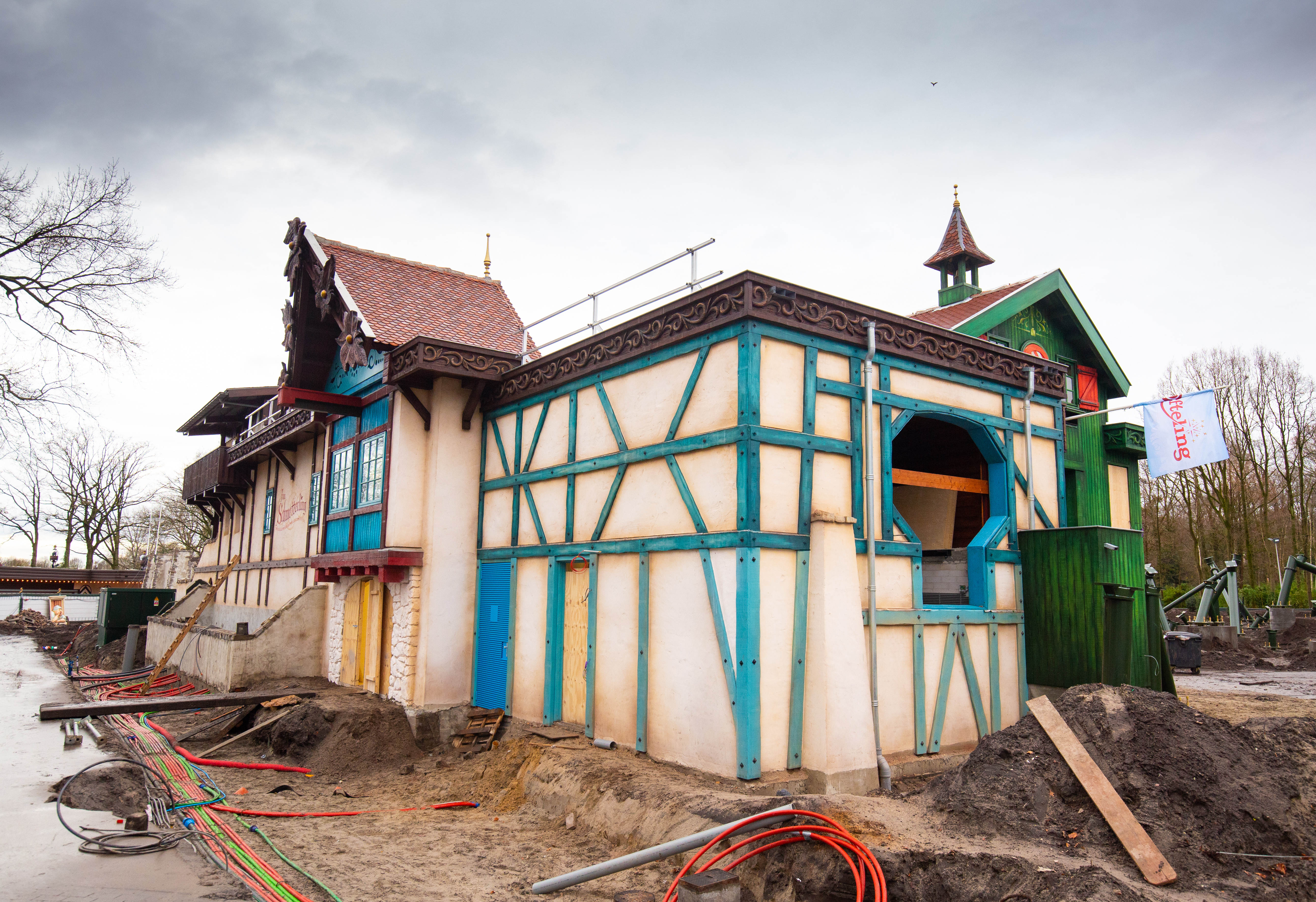 Het stationsgebouw van de achtaan Max & Moritz in de Efteling tijdens de bouwwerkzaamheden